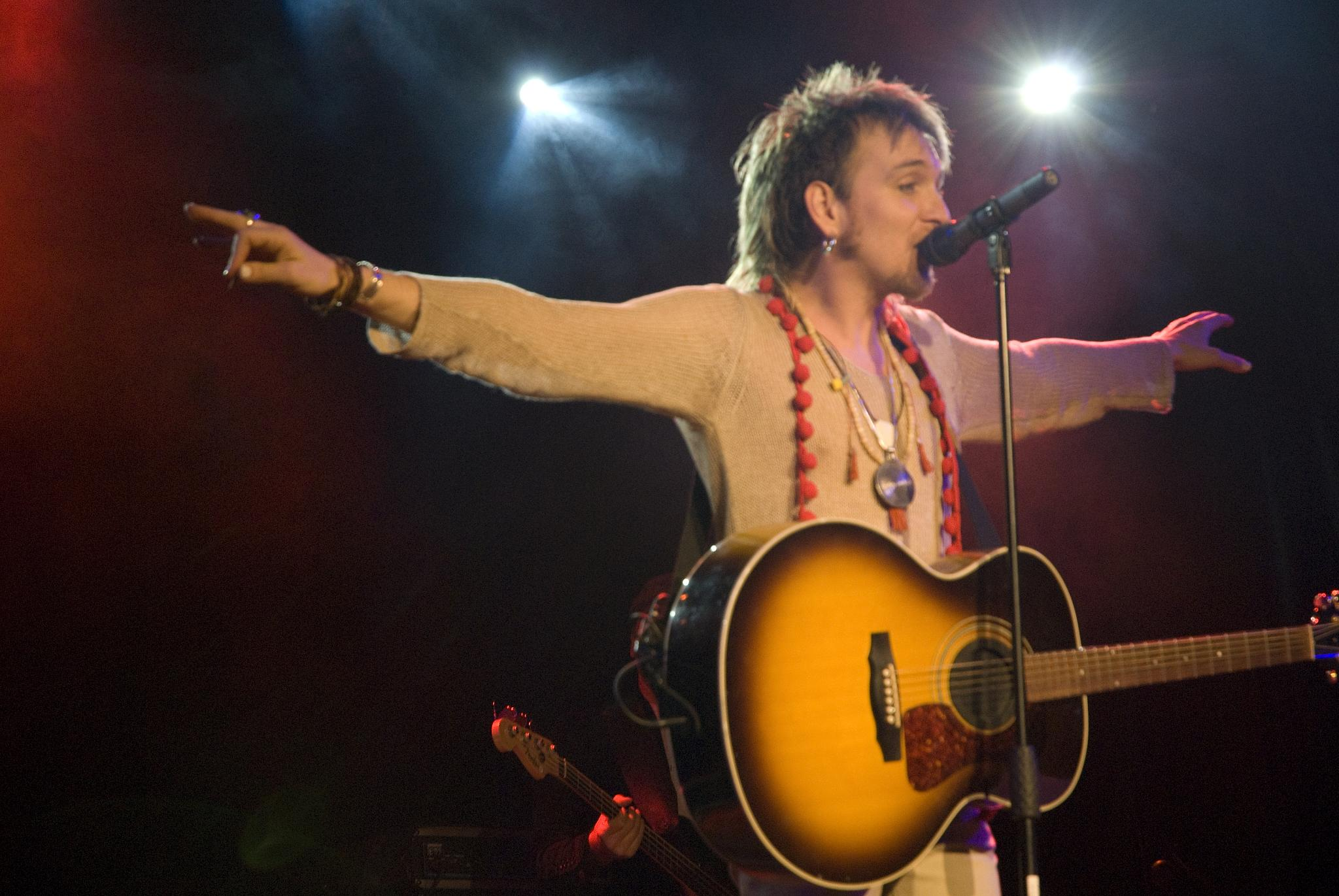 El cantante Shuarma tocando su guitarra durante una actuación en directo.